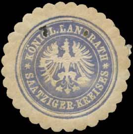 Sealing stamp Title: K. Landrath Saatziger Kreises Description: blau, weiß, geprägt Place: Saatzig/Pommern size: 3 cm